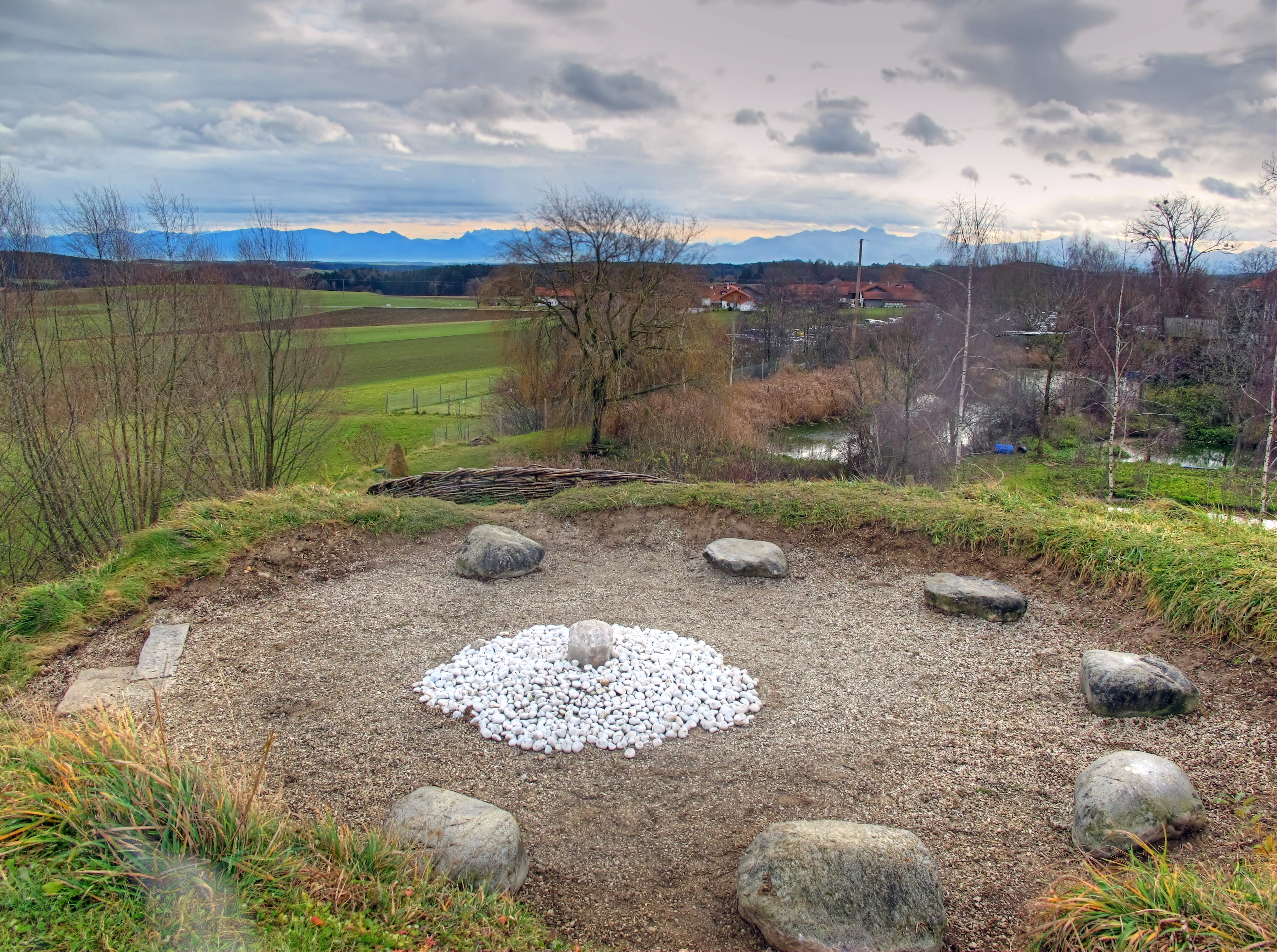 Deutschland, Bayern, Oberbayern, Landkreis Ebersberg, Gemeinde Glonn, Herrmannsdorfer Landwerkstätten, Steinkreis inmitten des Labyrinth-Hügels